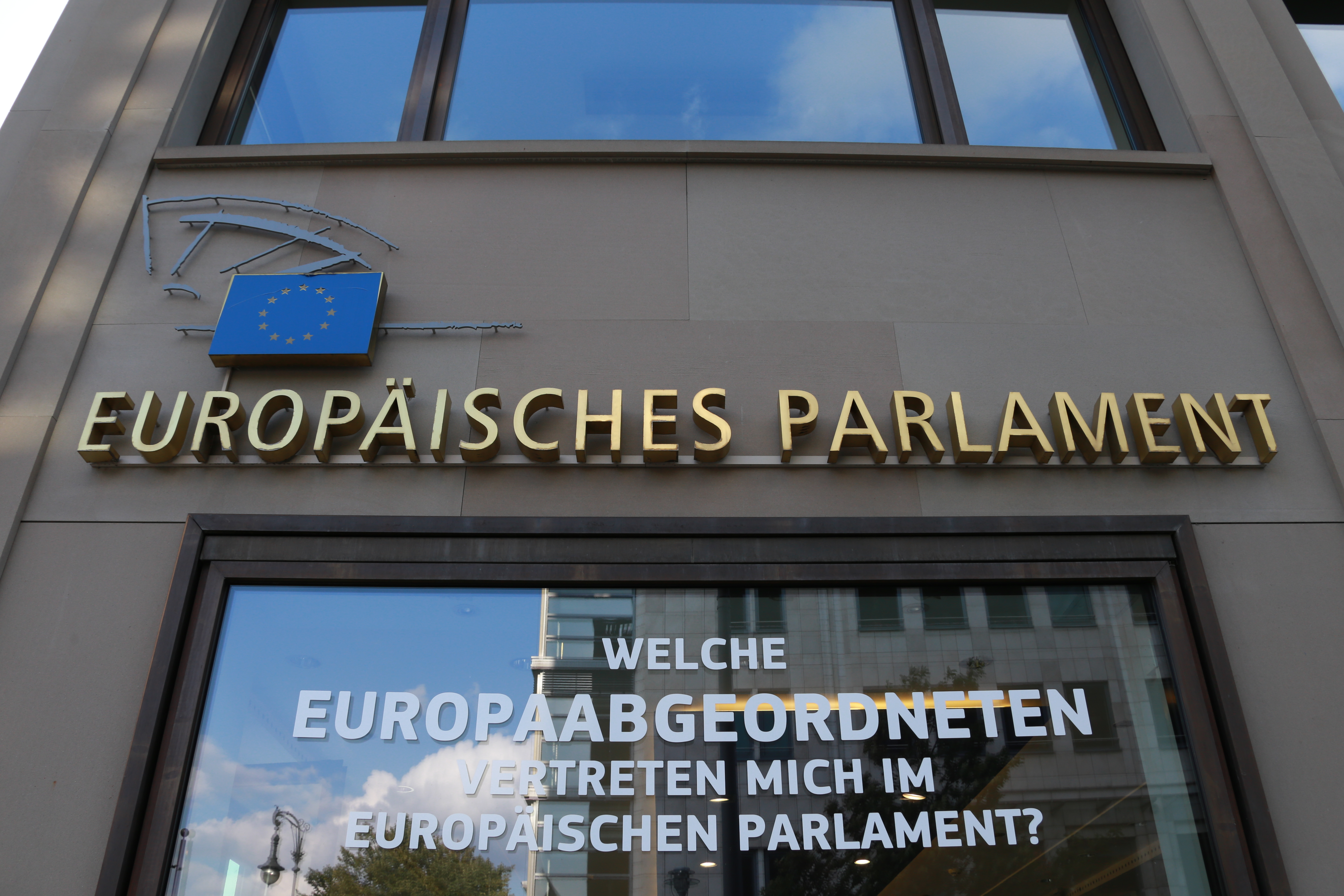 Europäisches Parlament, Europäisches Haus Berlin am Brandenburger Tor